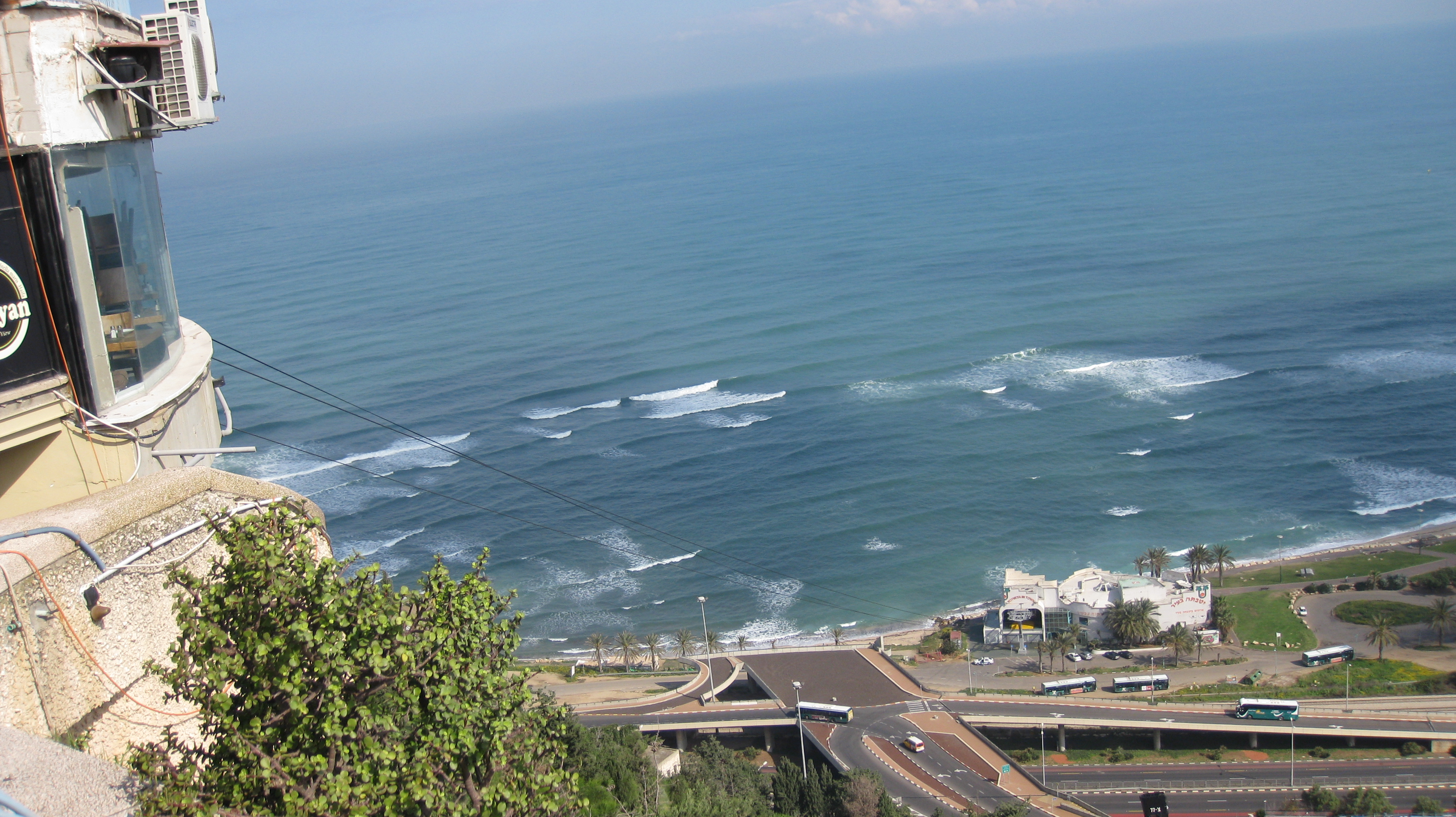 Views from the Stella Maris Observatory הנוף הנשקף ממצפור סטלה מאריס